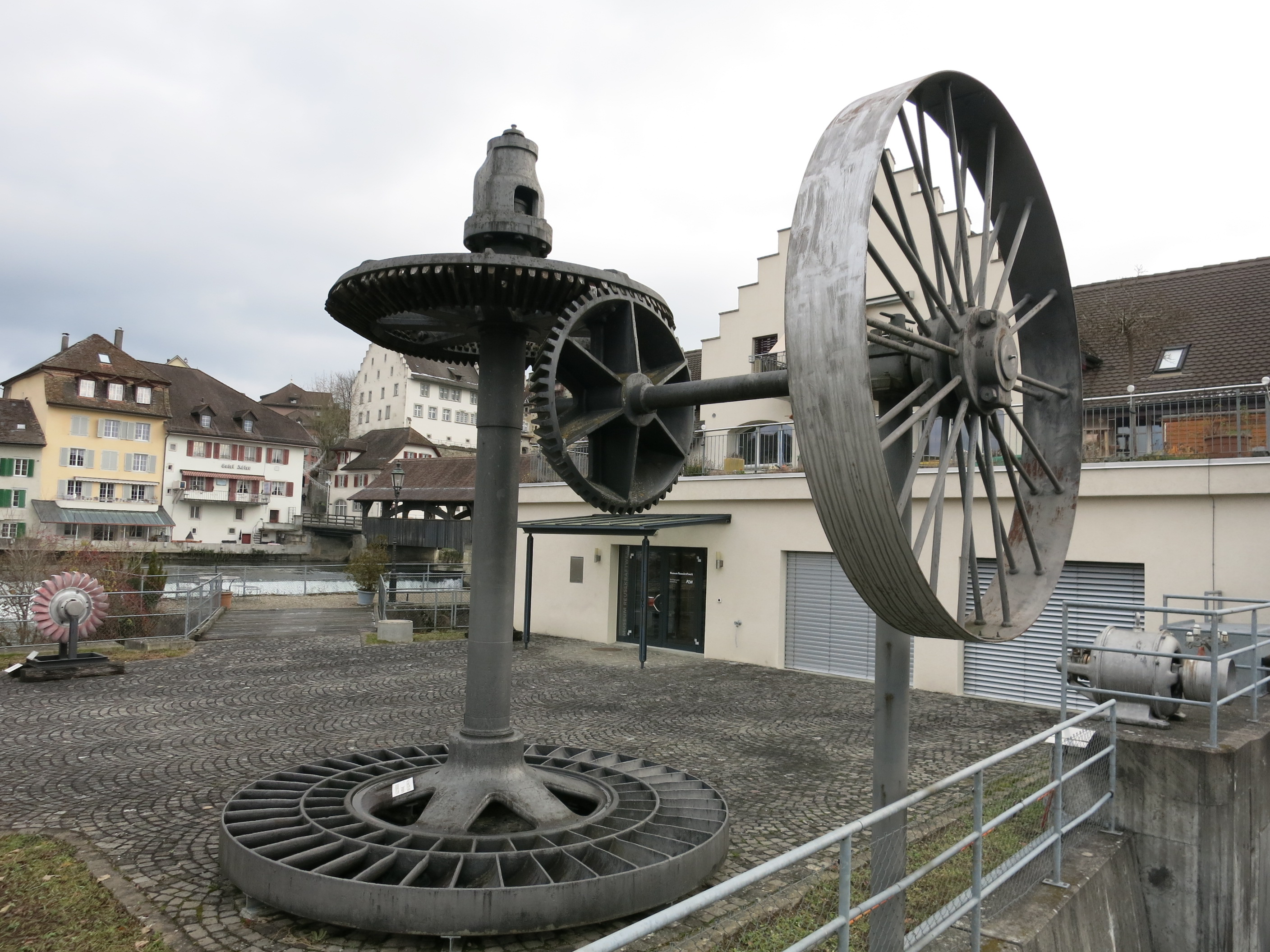 Kraftwerk Bruggmühle, Bremgarten AG, Schweiz